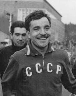 Gainan Saidkhuzhin